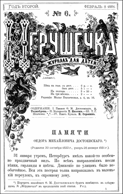 Журнал "Игрушечка" 1881, № 6. Александра Пешкова-Толиверова. Некролог Ф. М. Достоевскому